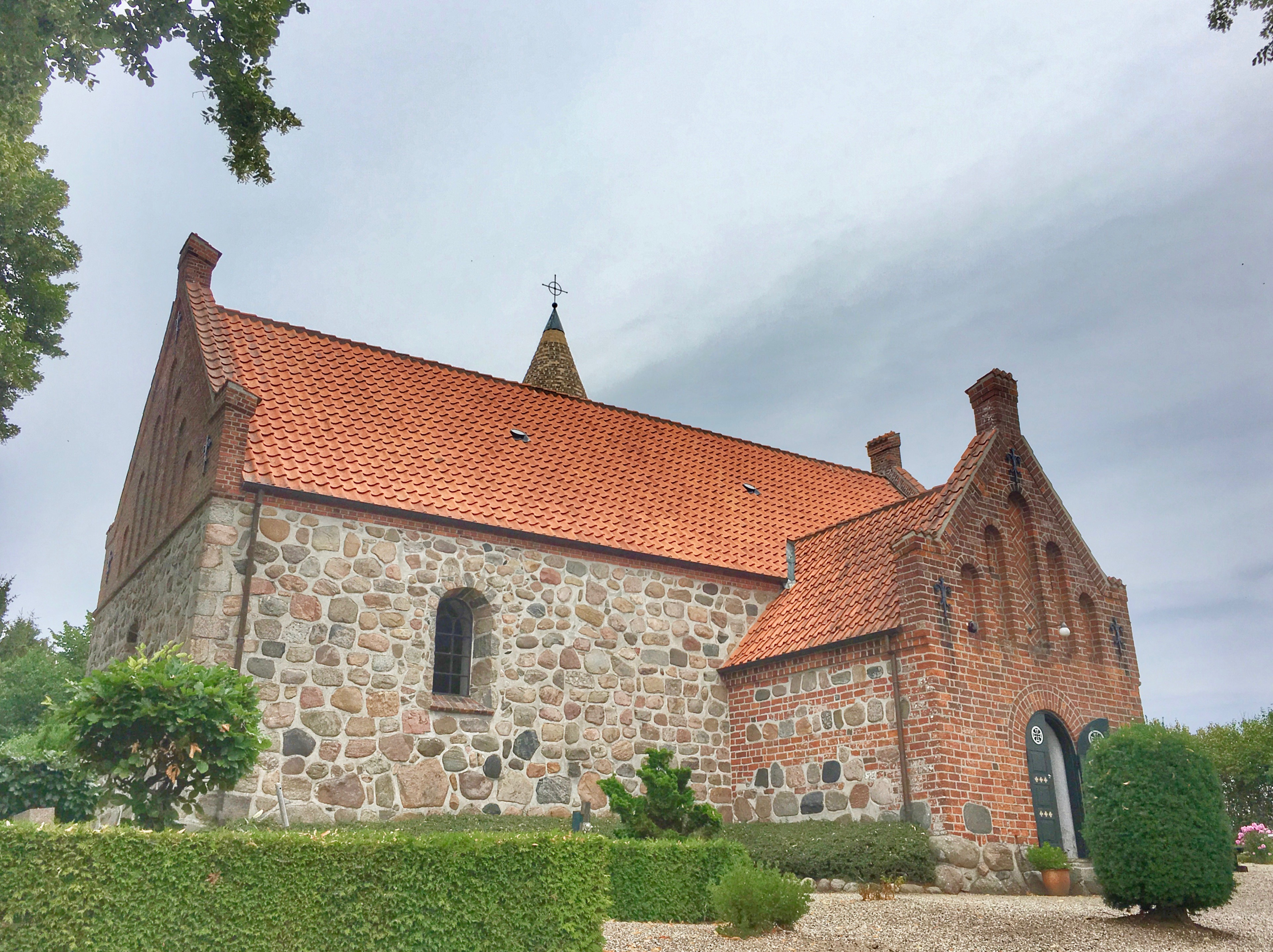 Vellerup Kirke set fra sydvest, Hornsherred, Sjælland